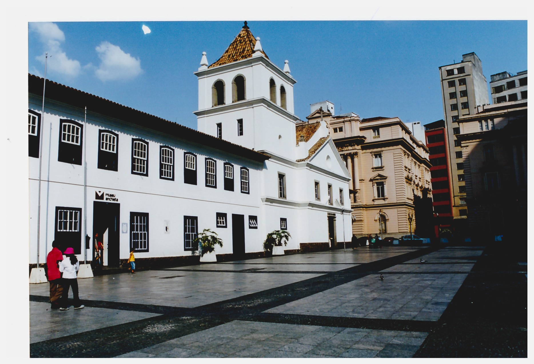 Creditos: Bruna Burro